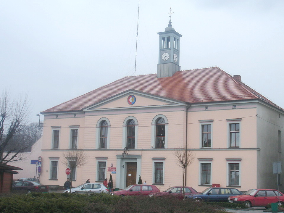 Dobrodzień, März 2006